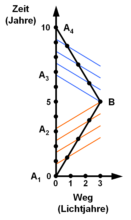 Weg-Zeit-Diagramm zum Zwillingsparadoxon für eine Reise mit 60% der Lichtgeschwindigkeit.